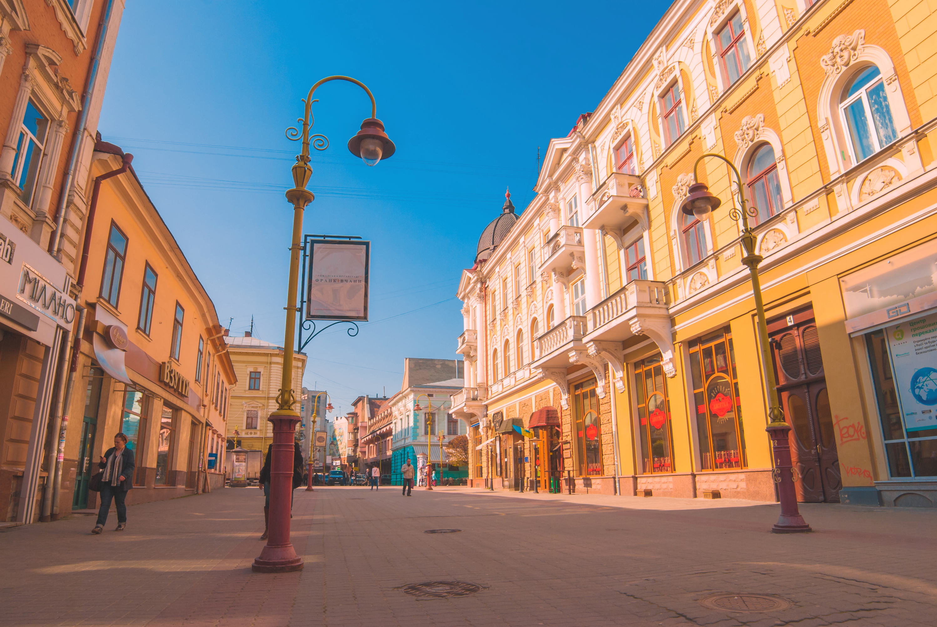 Житловий будинок (мур.), Івано-Франківськ, вул. Шашкевича, 2